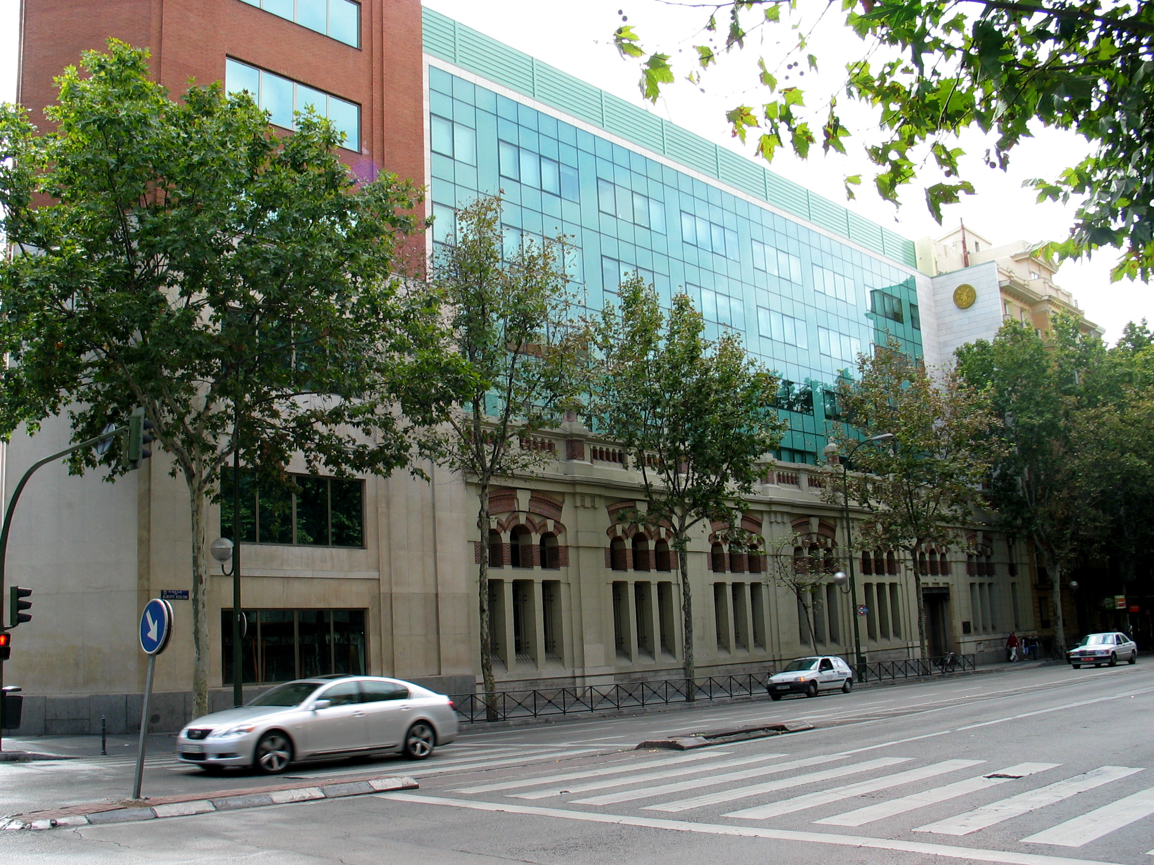 Fachada principal de ICAI - Universidad Pontificia de Comillas